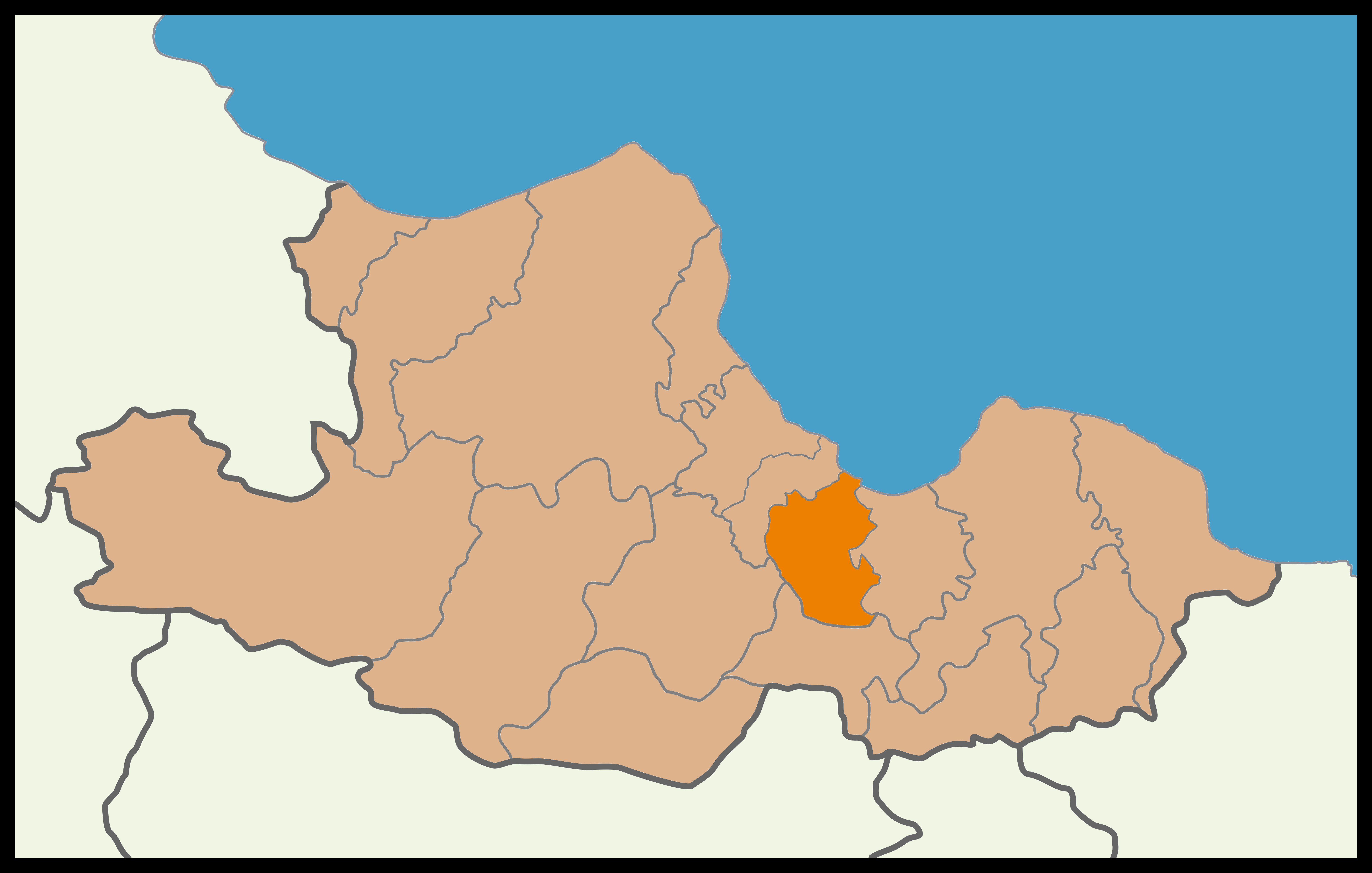 Samsun'un Canik ilçesinin 2014 Türkiye yerel seçimleri haritası.